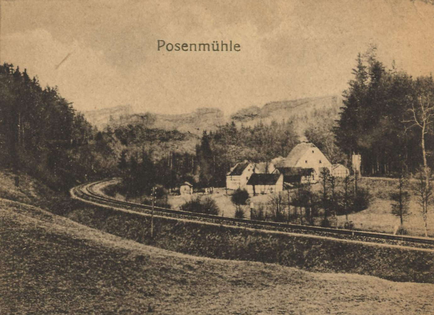 Die Posenmühle bei Knau, Pension Raiffeisenhaus, Bahnhaltepunkt Posenmühle an der Strecke Triptis-Marxgrün